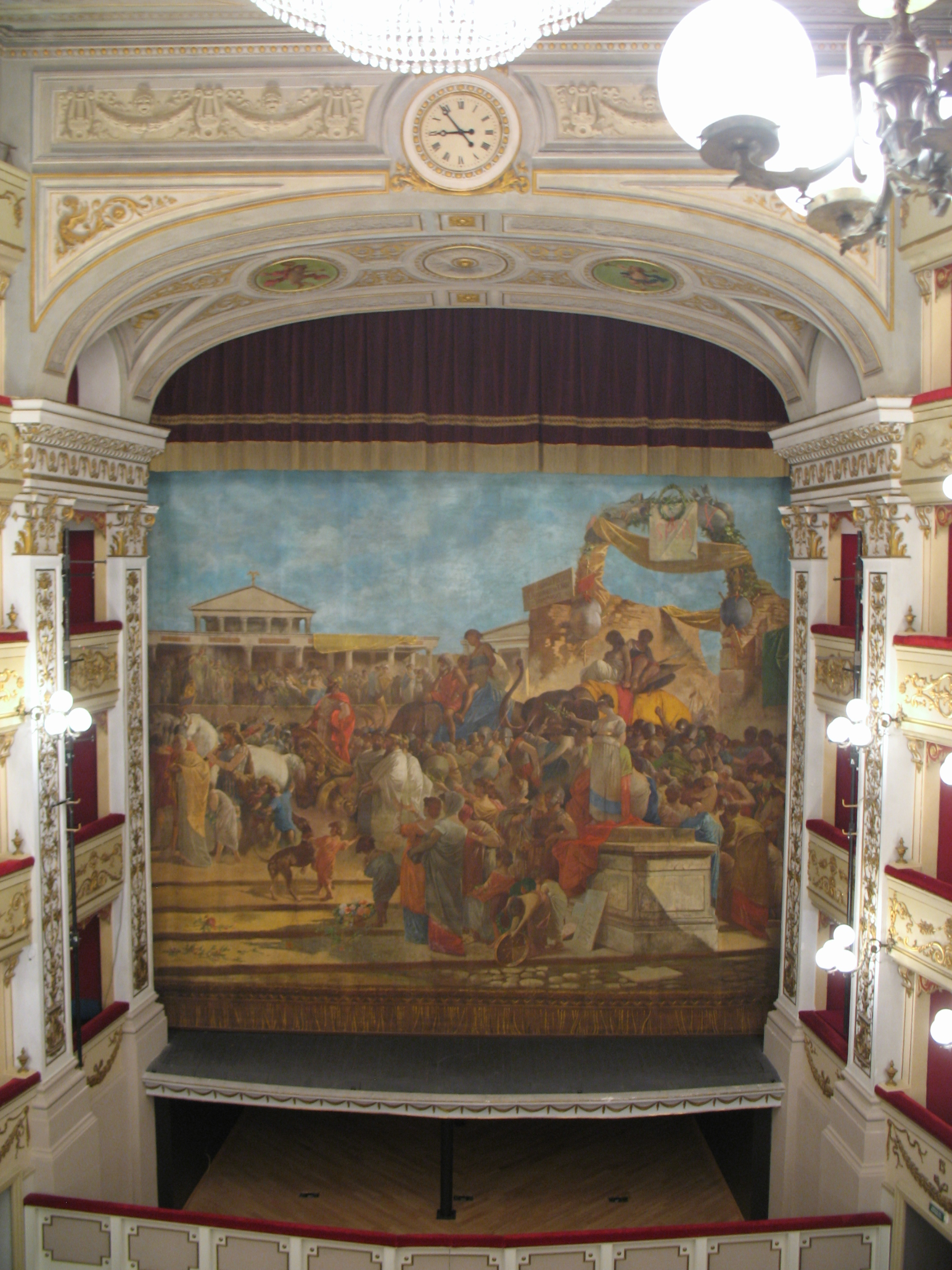 Palco del Teatro Marrucino a Chieti